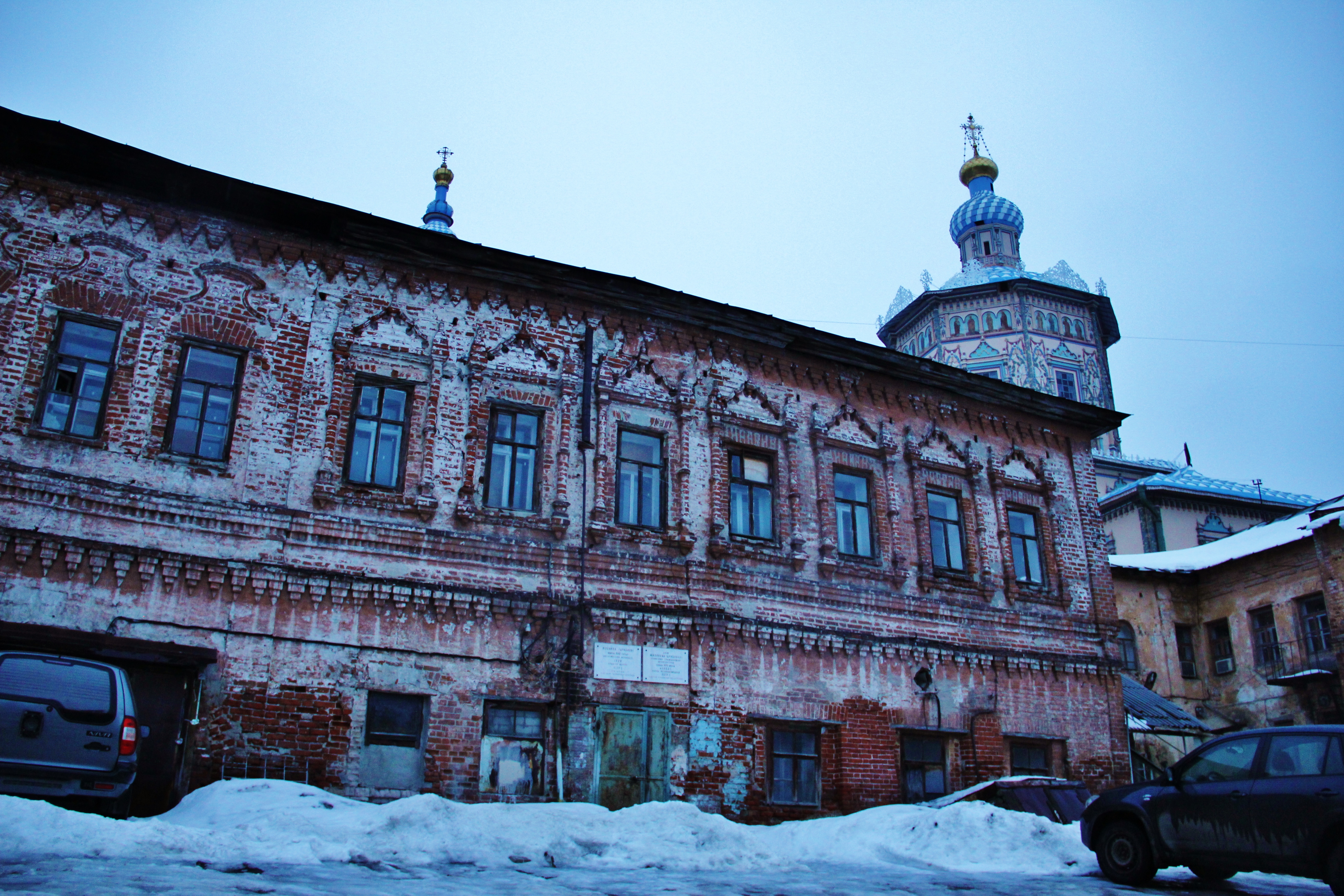 Памятник гражданской архитектуры 17 века. В 1722 здесь останавливался Петр Первый.